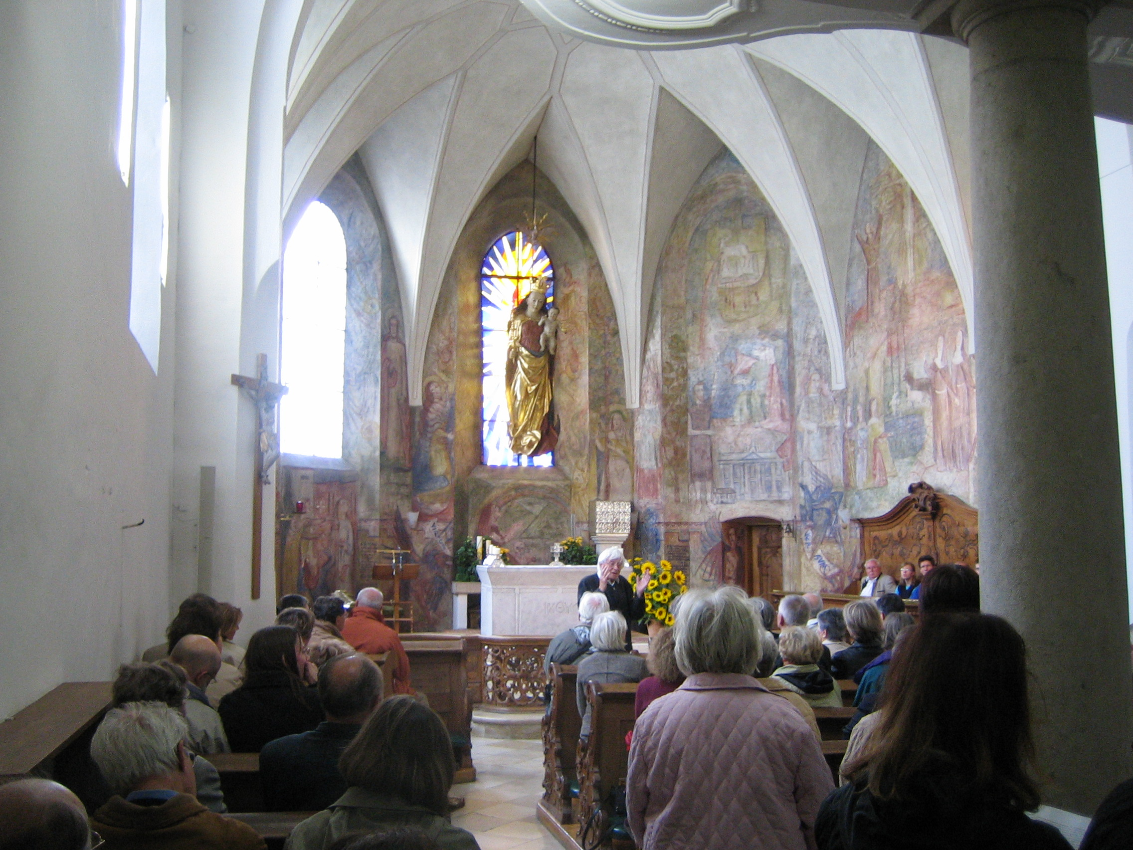 Blick auf Chor und Altar der Kirche St. Johann im Gnadenthal in Ingolstadt.